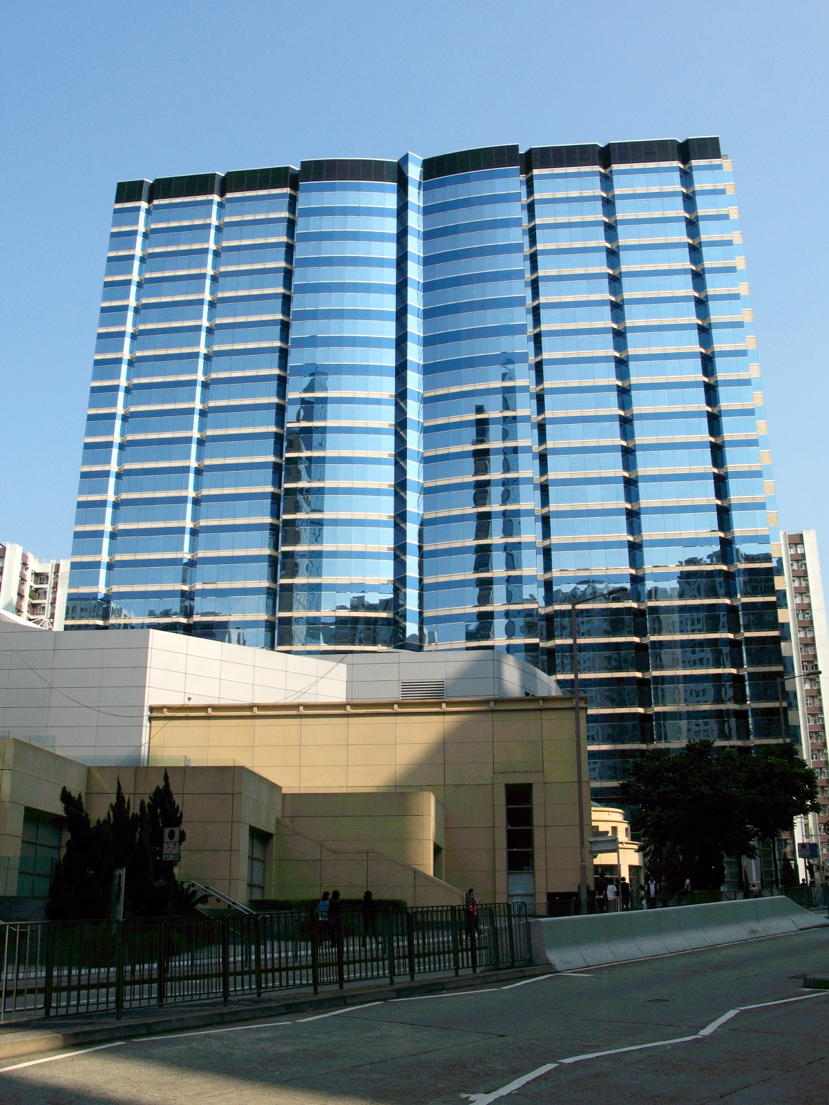 Cityplaza One